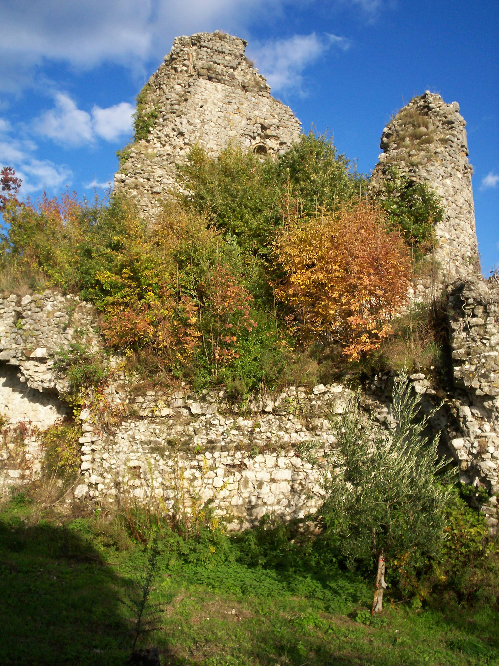 resti del Torrione della vecchia Cerreto in Cerreto Sannita